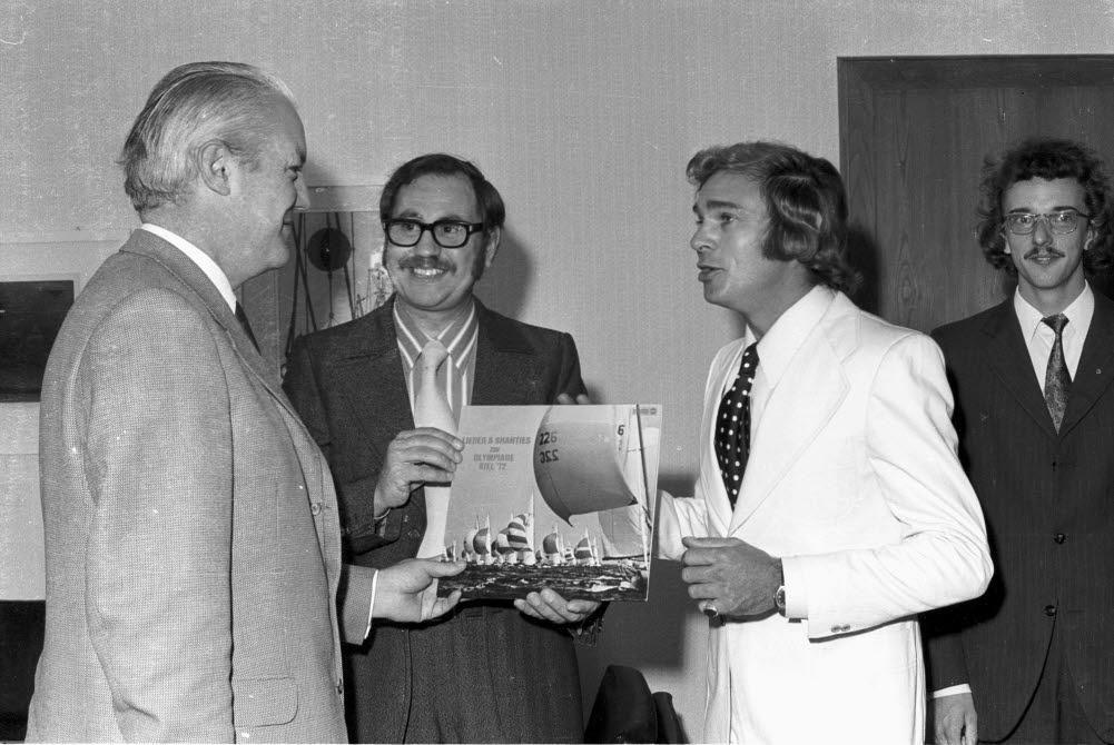 V.l. Ministerpräsident Dr. Gerhard Stoltenberg, Gerd Schulz, Leiter der Band "Centauris", und Sven Jenssen. Jenssen und die "Centauris" haben auf einer Langspielplatte "Lieder und Shanties zur Olympiade Kiel 1972" aufgenommen.